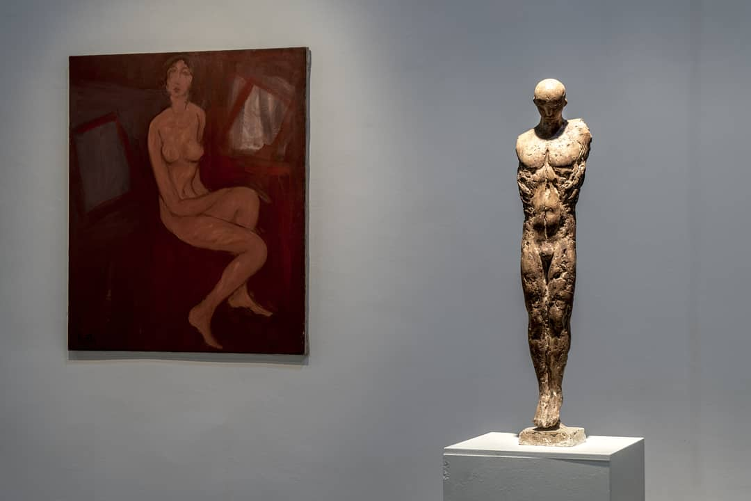 Izložba u Galeriji svetog Krševana, Šibenik, godina 2019